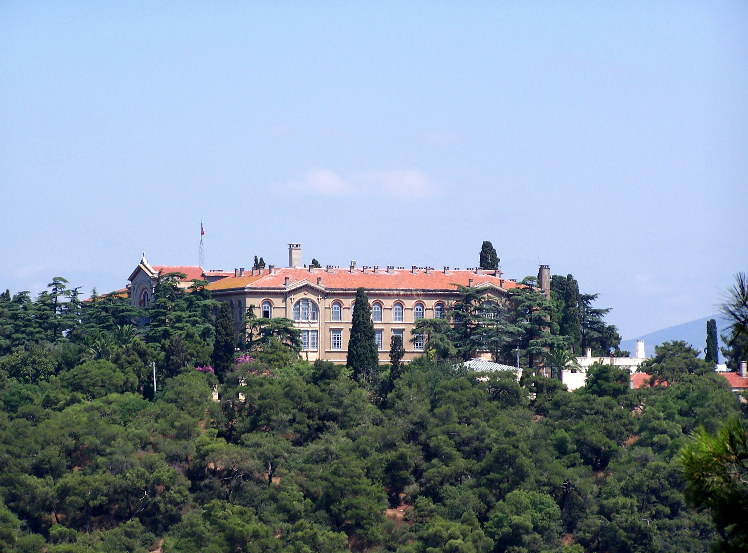 Ayatriada Manastırı (Halki seminary) in Heybeliada, Turkey